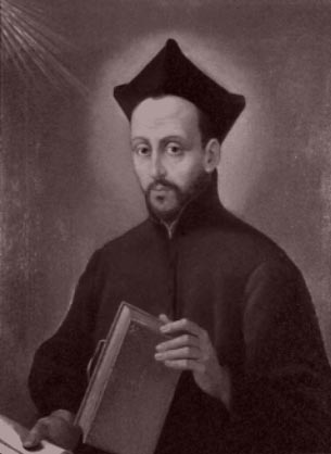 Antonio Maria Zaccaria (1502−1539), war der Begründer des Barnabitenordens und katholischer Heiliger